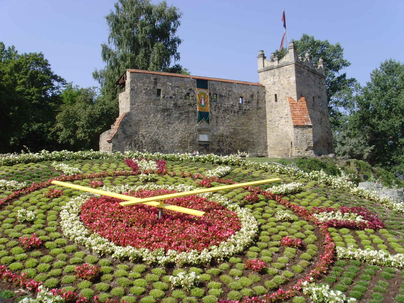 Zegar kwiatowy w Nowym Sączu. Znajduje się u podnóża ruin zamku królewskiego. Tarcza zegara ma 5 metrów średnicy.